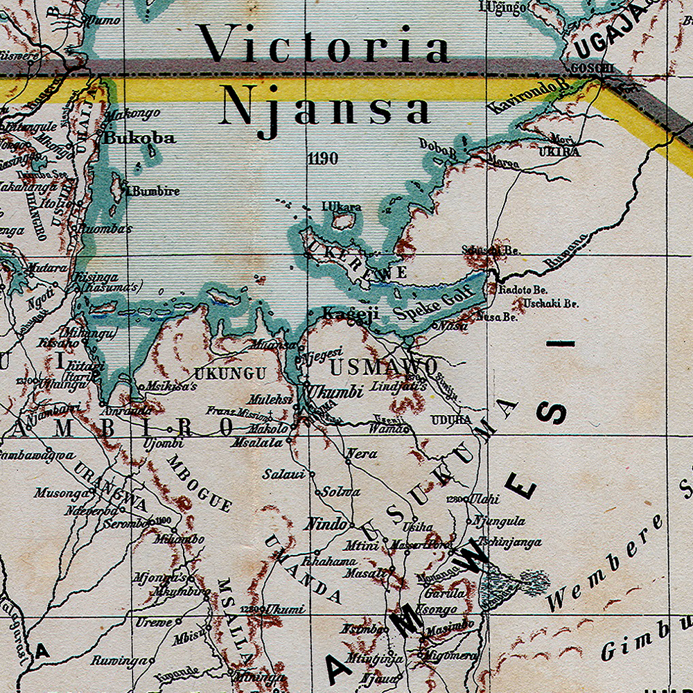 Usukuma. Landschaft in Deutsch Ost-Afrika 1892, heute Tansania.